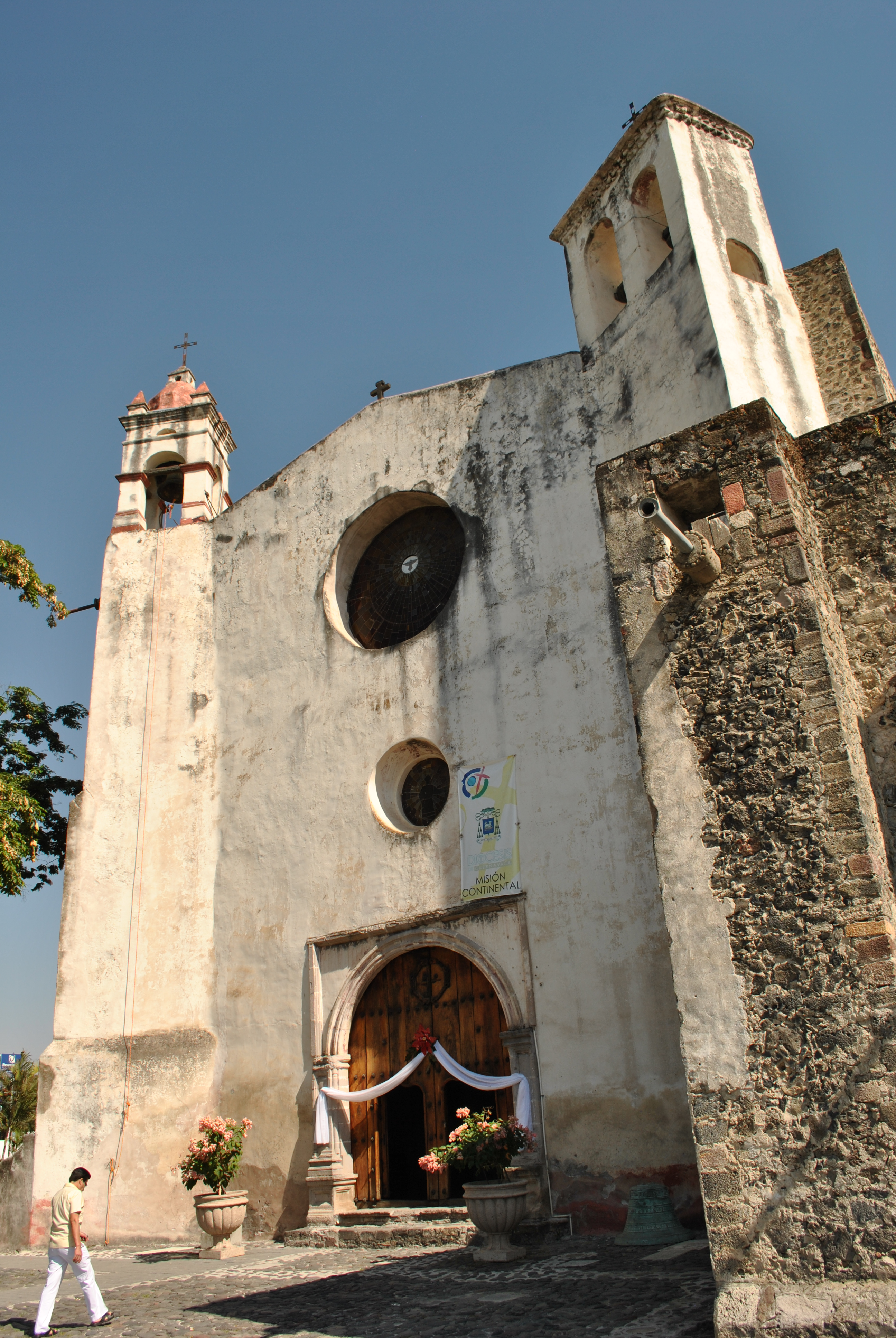 Portada del Ex Convento de Santo Domingo de Guzmán, Oaxtepec, Morelos.